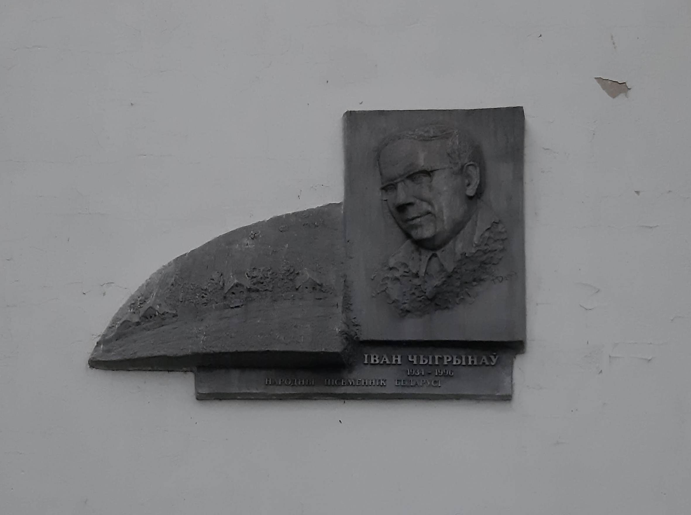 Магілёў. Петрапаўлаўскі сквер па Вялікай Чавускай